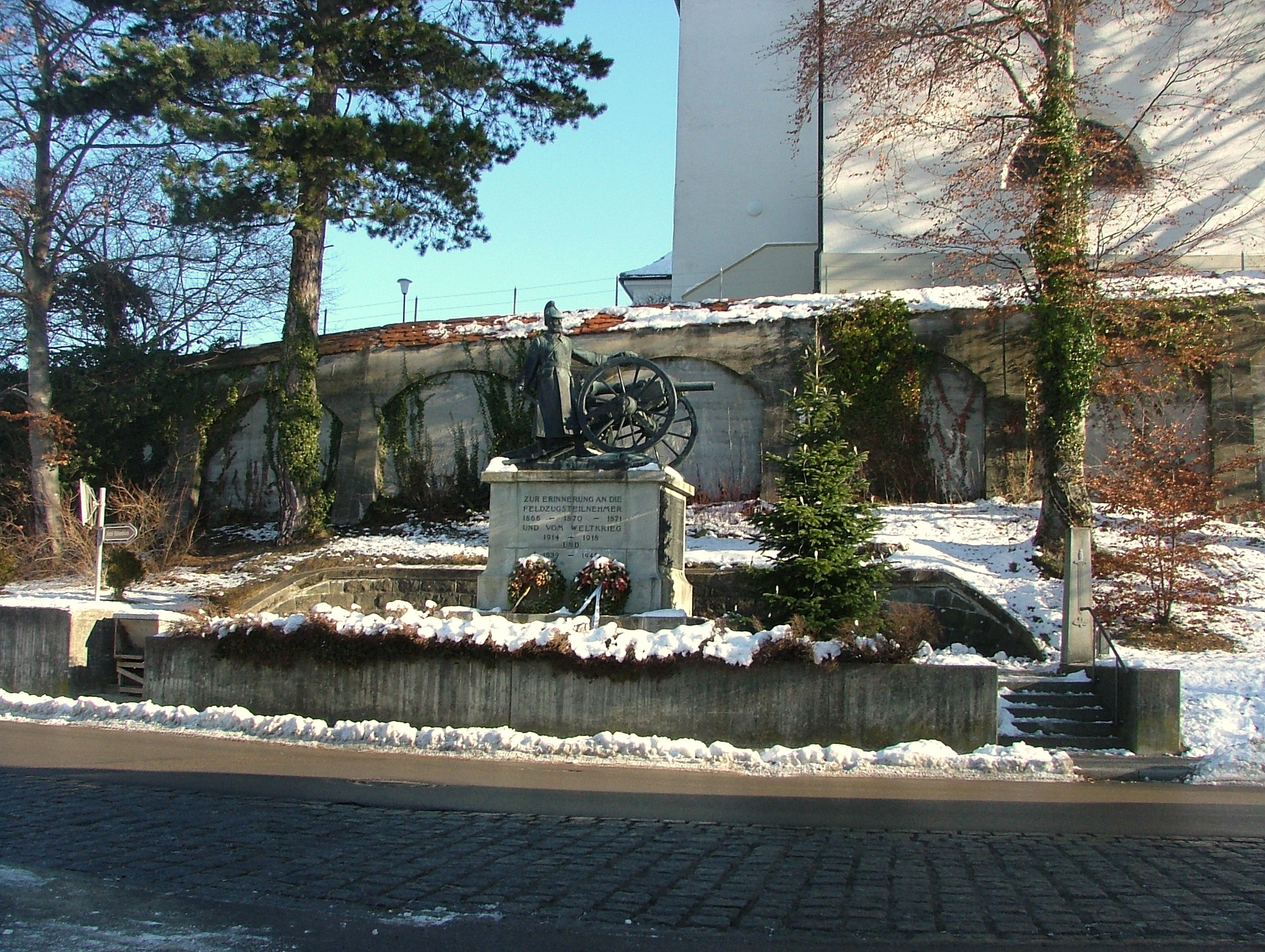 Haldenwang